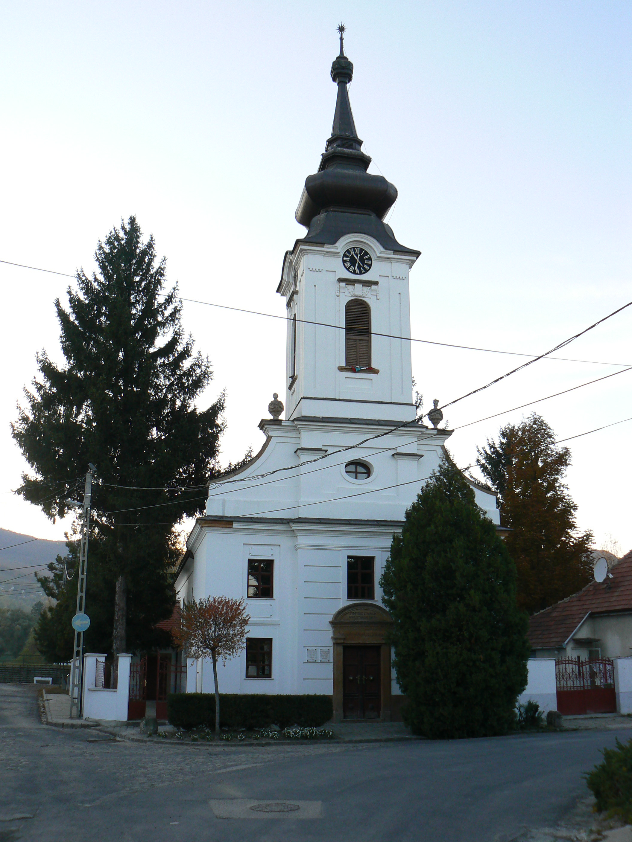 Pócsmegyer, Templom